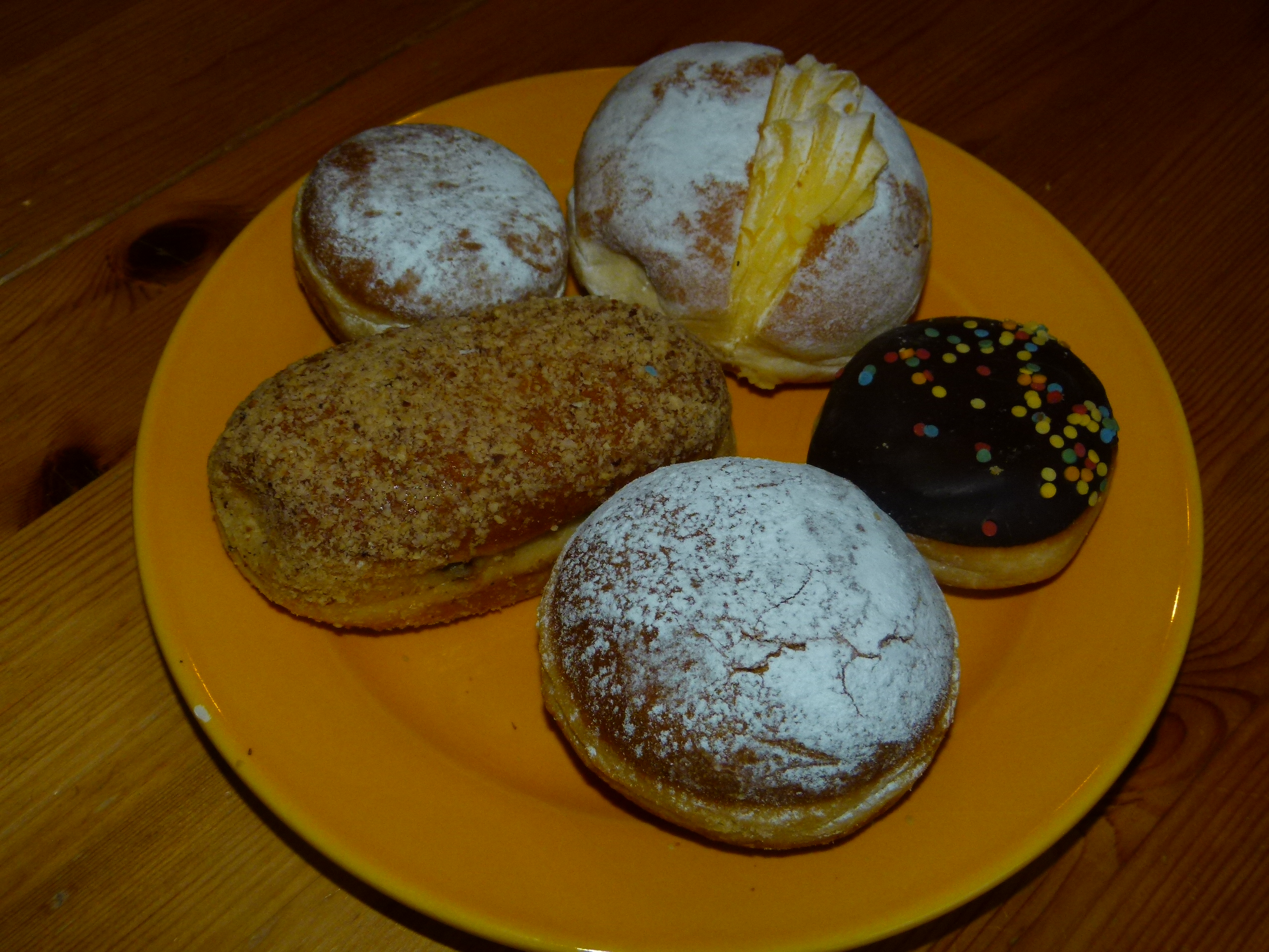 Wiener Krapfen mit Marillenmarmelade, Nougat, Vanille, Scholade bzw. Pudding